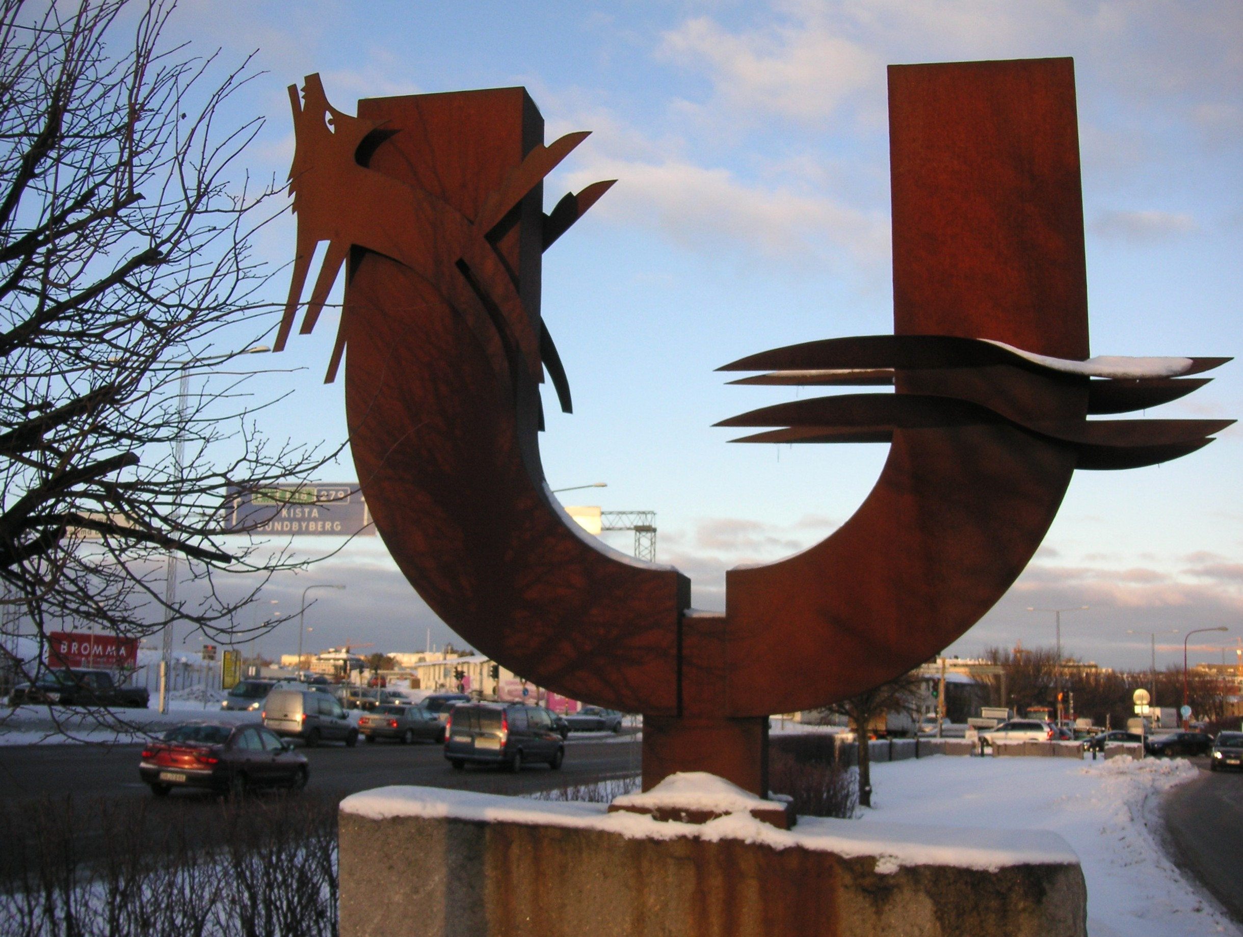 Skulptur "Ulvsunda insustriområde"